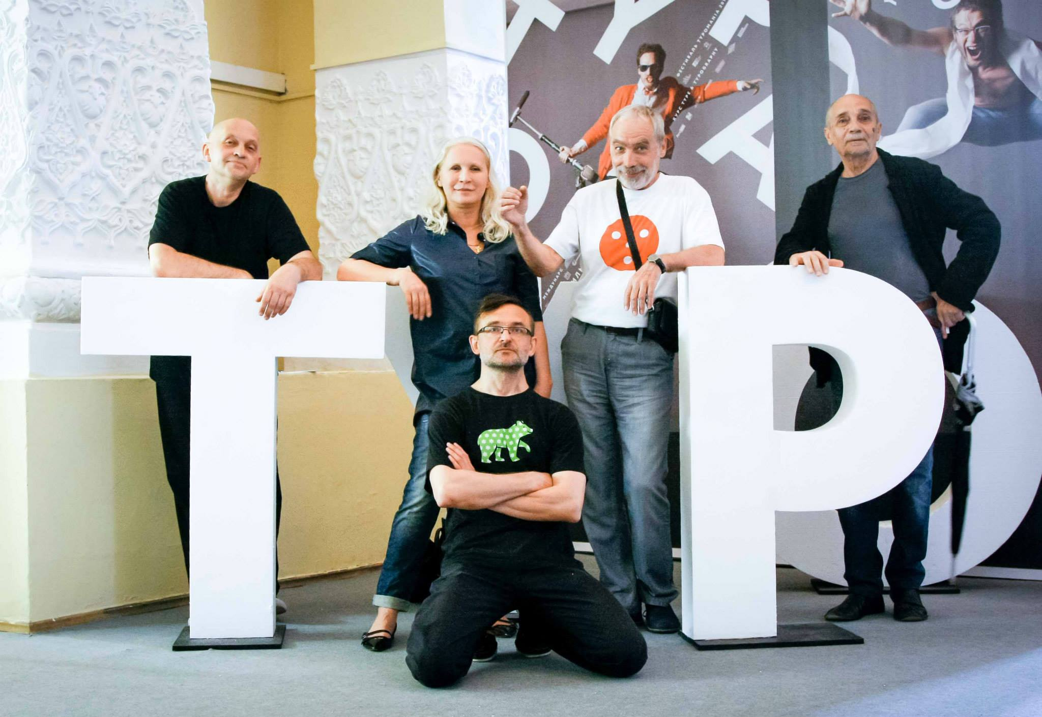 Typomania 2015. Андрей Шелютто, Елена Китаева, Андрей Логвин (на коленях), Василий Цыганков, Борис Трофимов